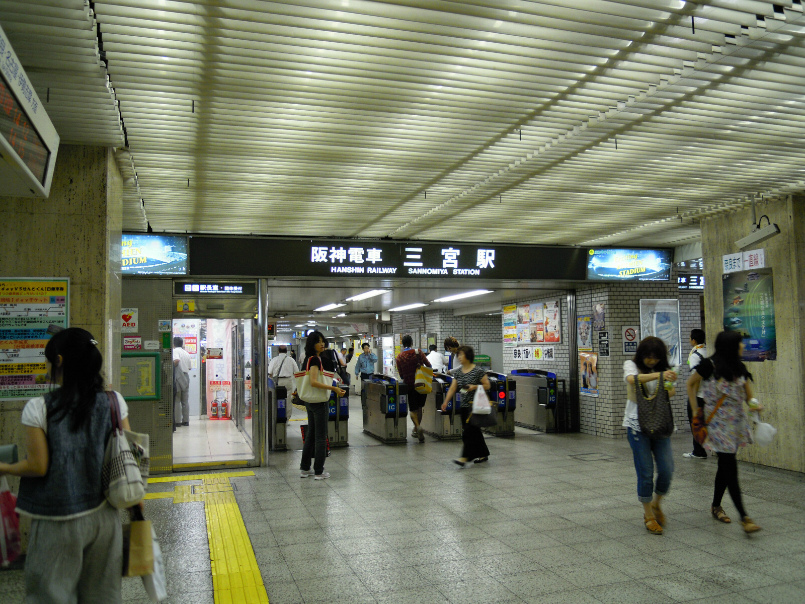 Hanshin Sannomiya station ticket gate